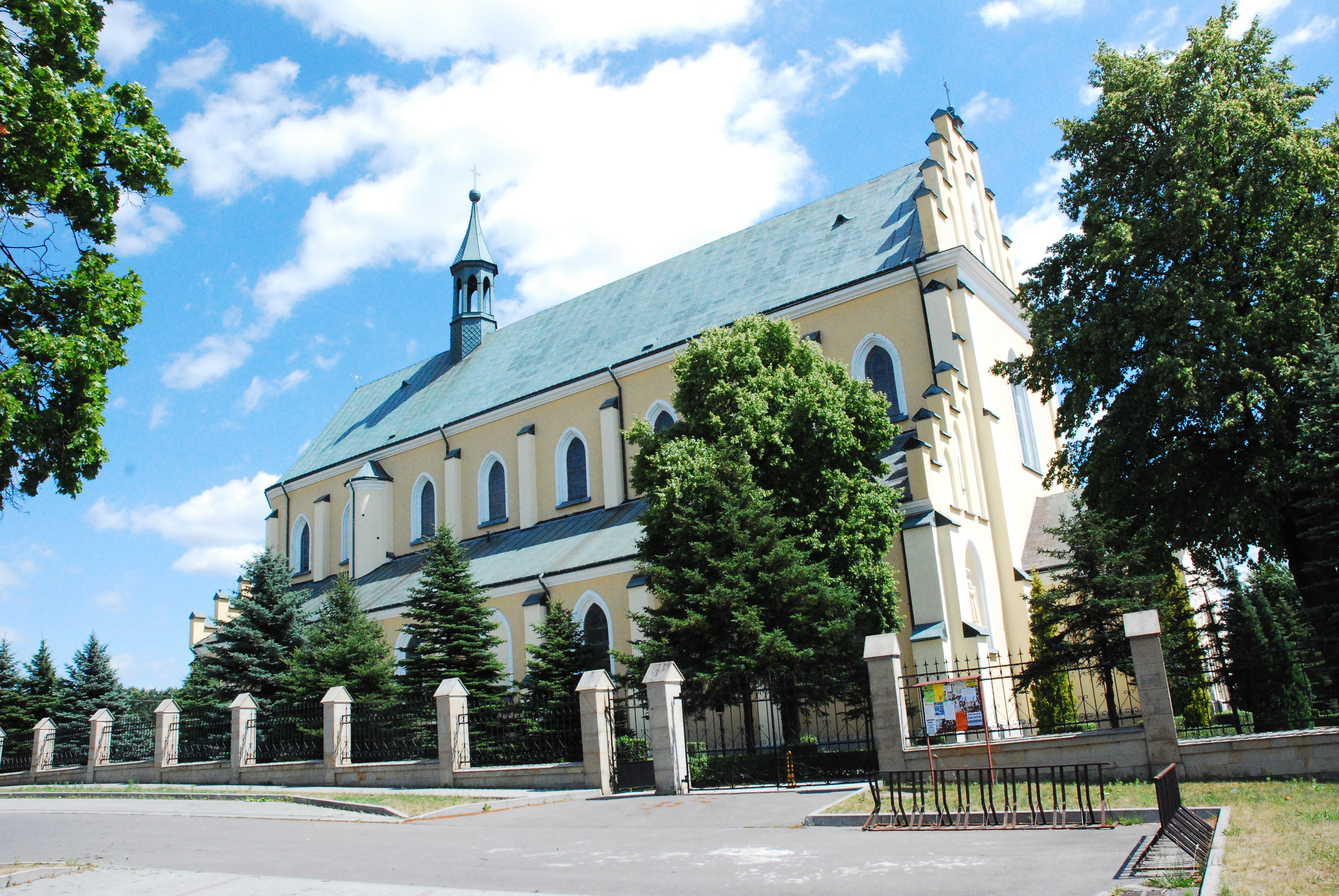 Kościół św. Jana Kantego w Żołyni.